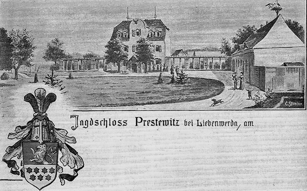 Das Jagdschloss Prestewitz auf einer Ansichtskarte von 1900